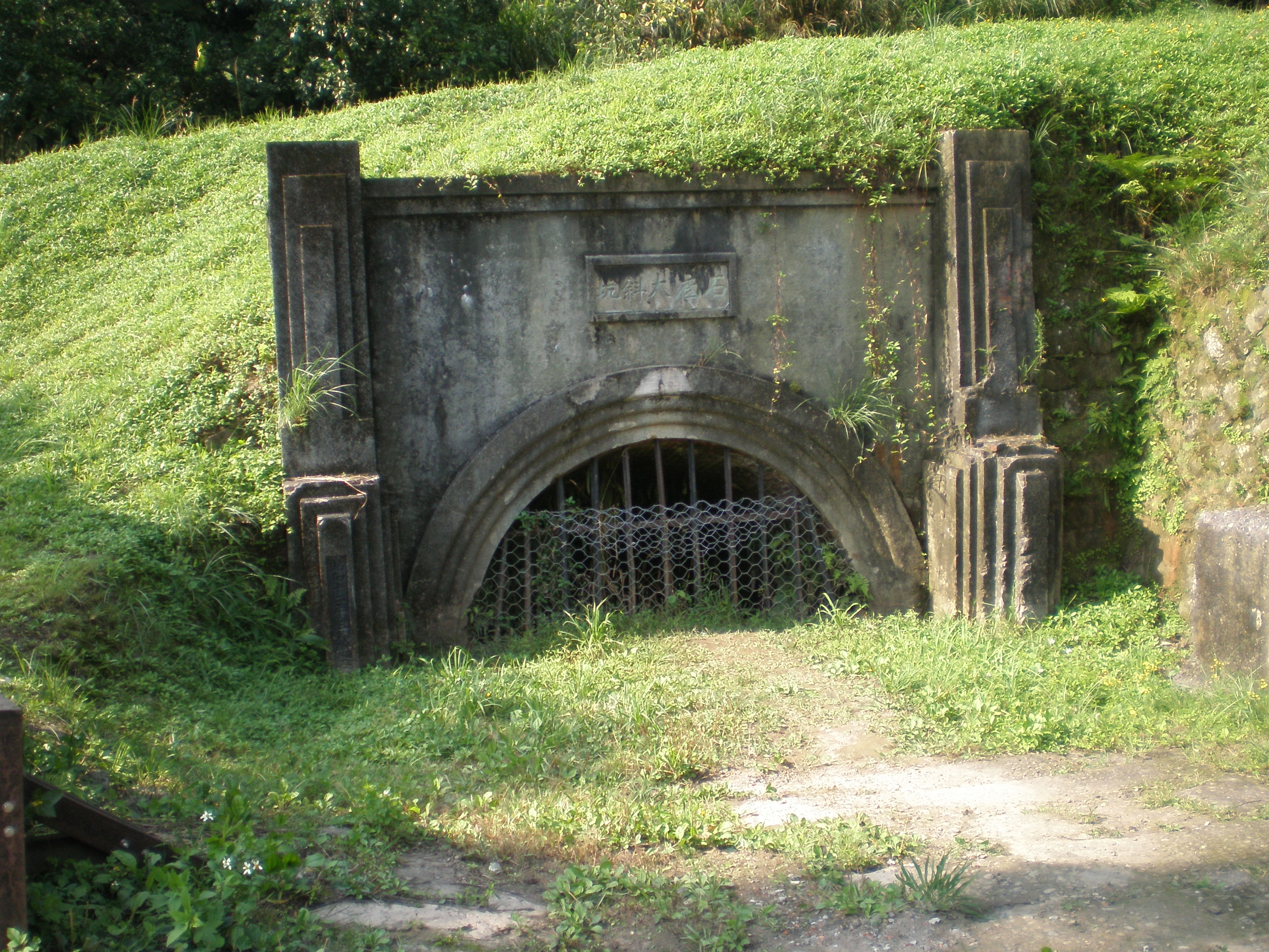 位於台灣新北市平溪區的石底大斜坑煤礦場